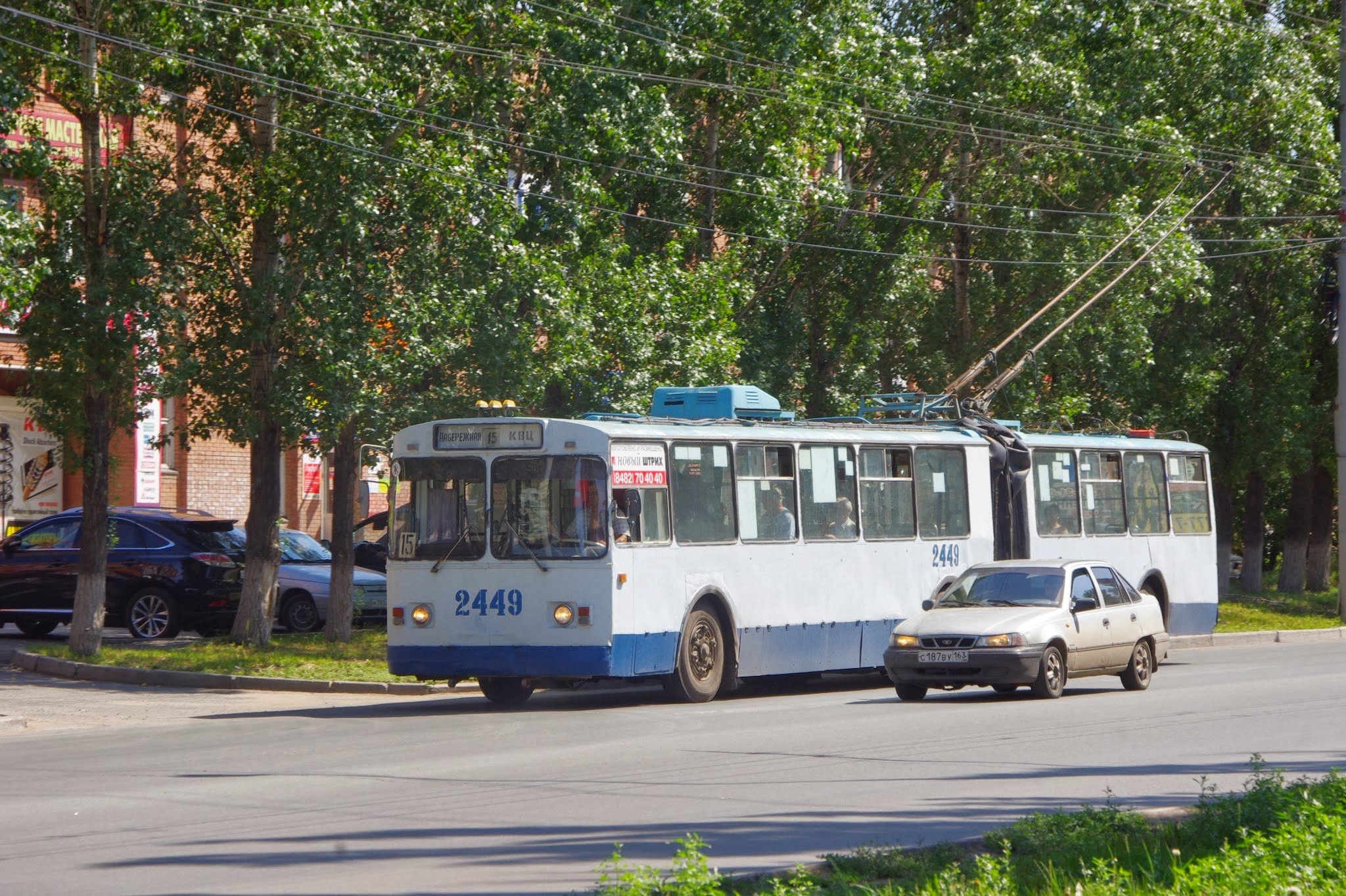 Avtozavodskiy rayon, Tolyatti, Samarskaya oblast', Russia